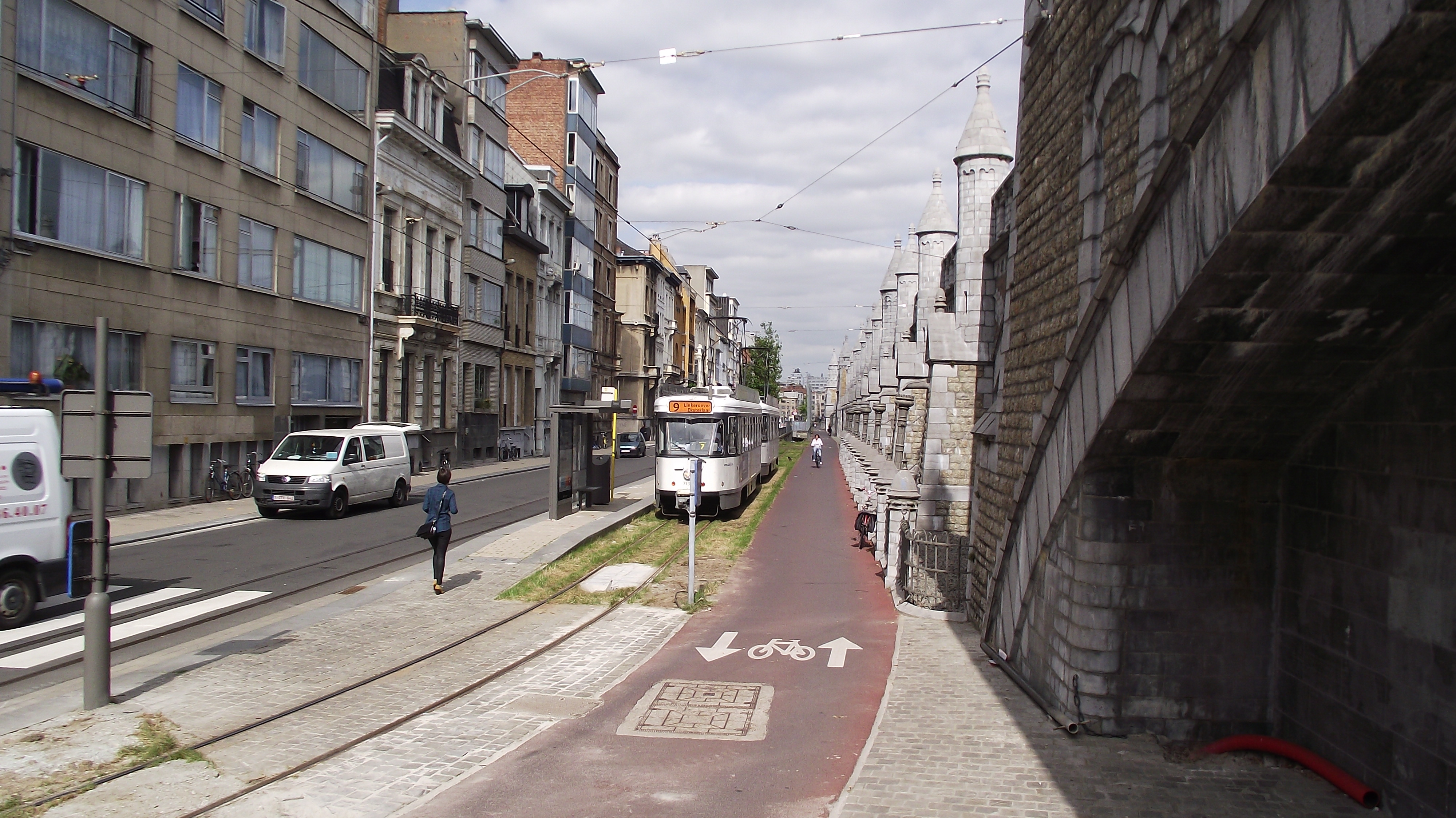 Nieuw eilandperron tramlijn 9, fietspad en spoorviaduct. Links rijdende tram richting voorstad.